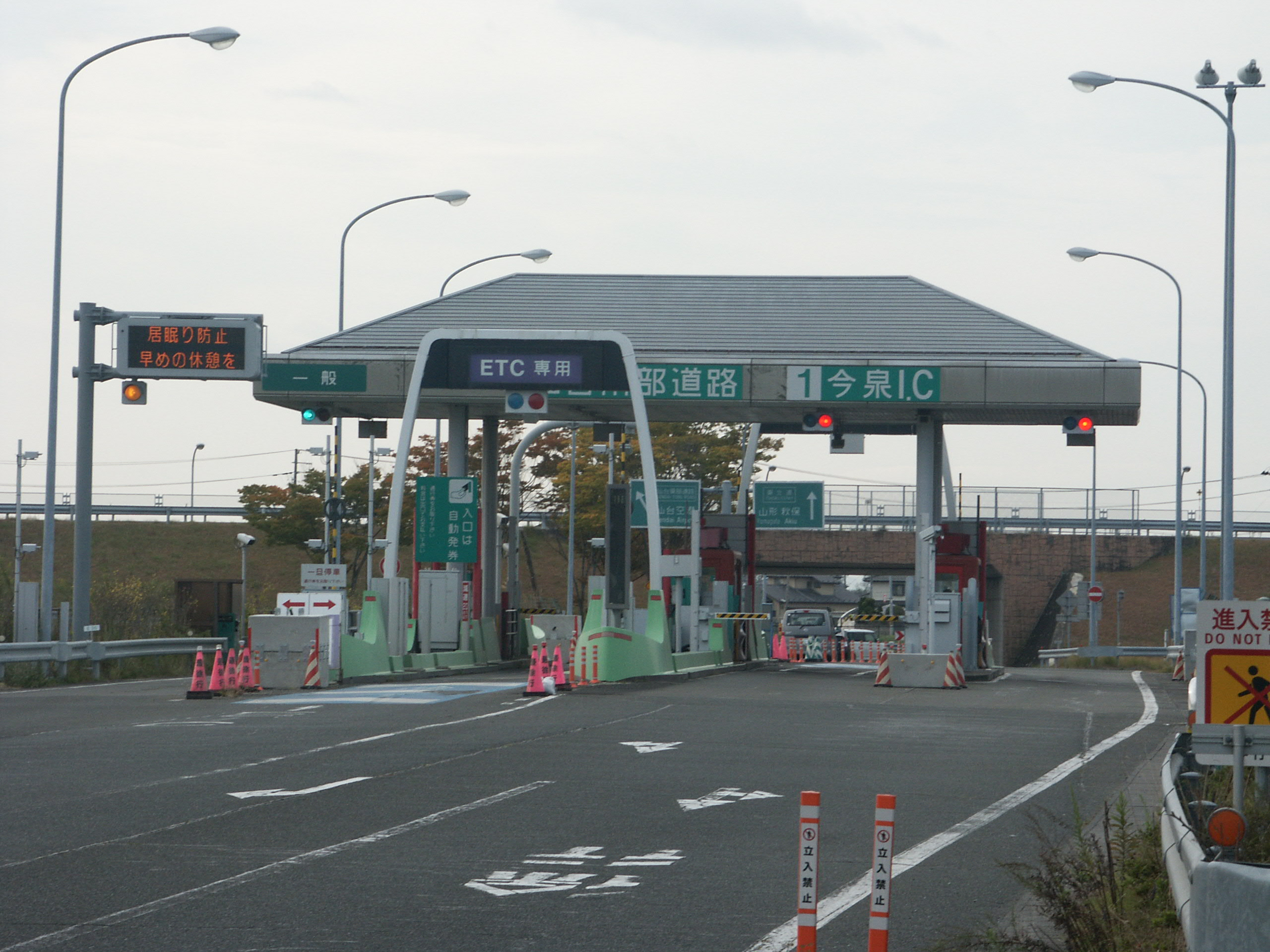 仙台南部道路今泉IC料金所